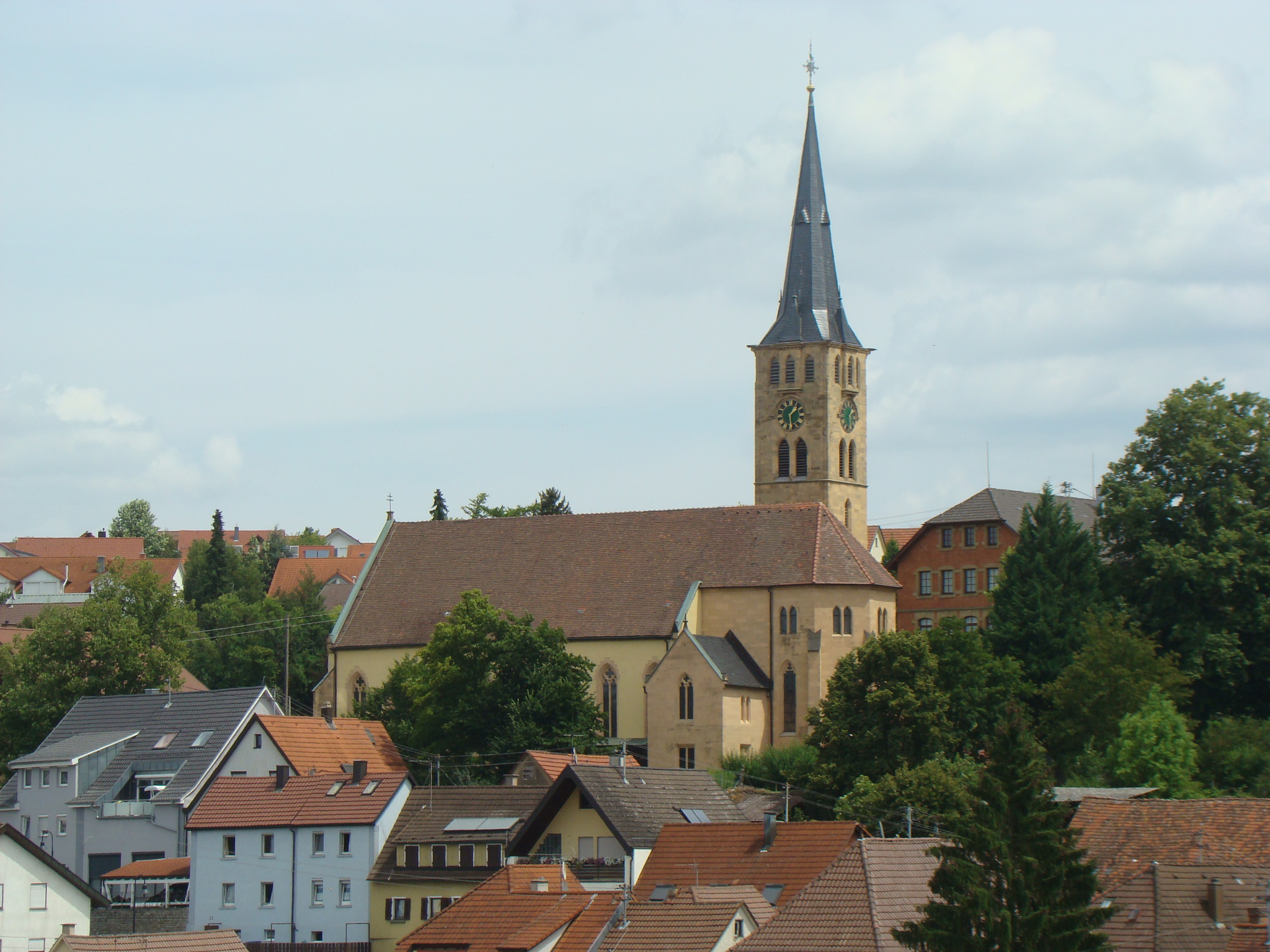 Kath. Kirche Mariä Himmelfahrt in Talheim (Lkr. Heilbronn)